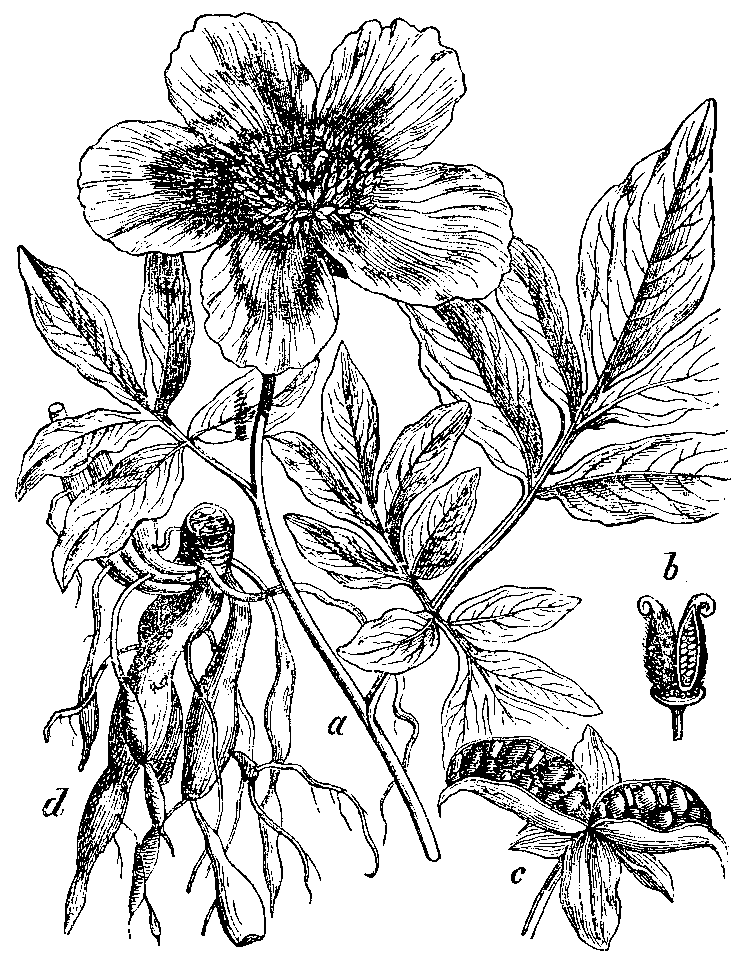 Slika 42. Potonika. (Paeónia officinális.)